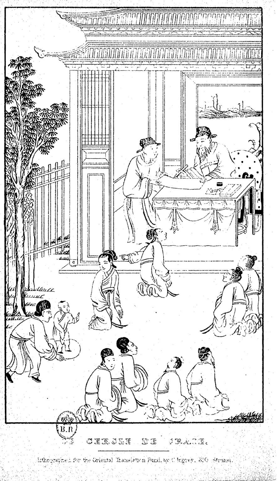 Illustration de Hoeï-lan-ki, ou L'histoire du cercle de craie : drame en prose et en vers / traduit du chinois et accompagné de notes par Stanislas Julien